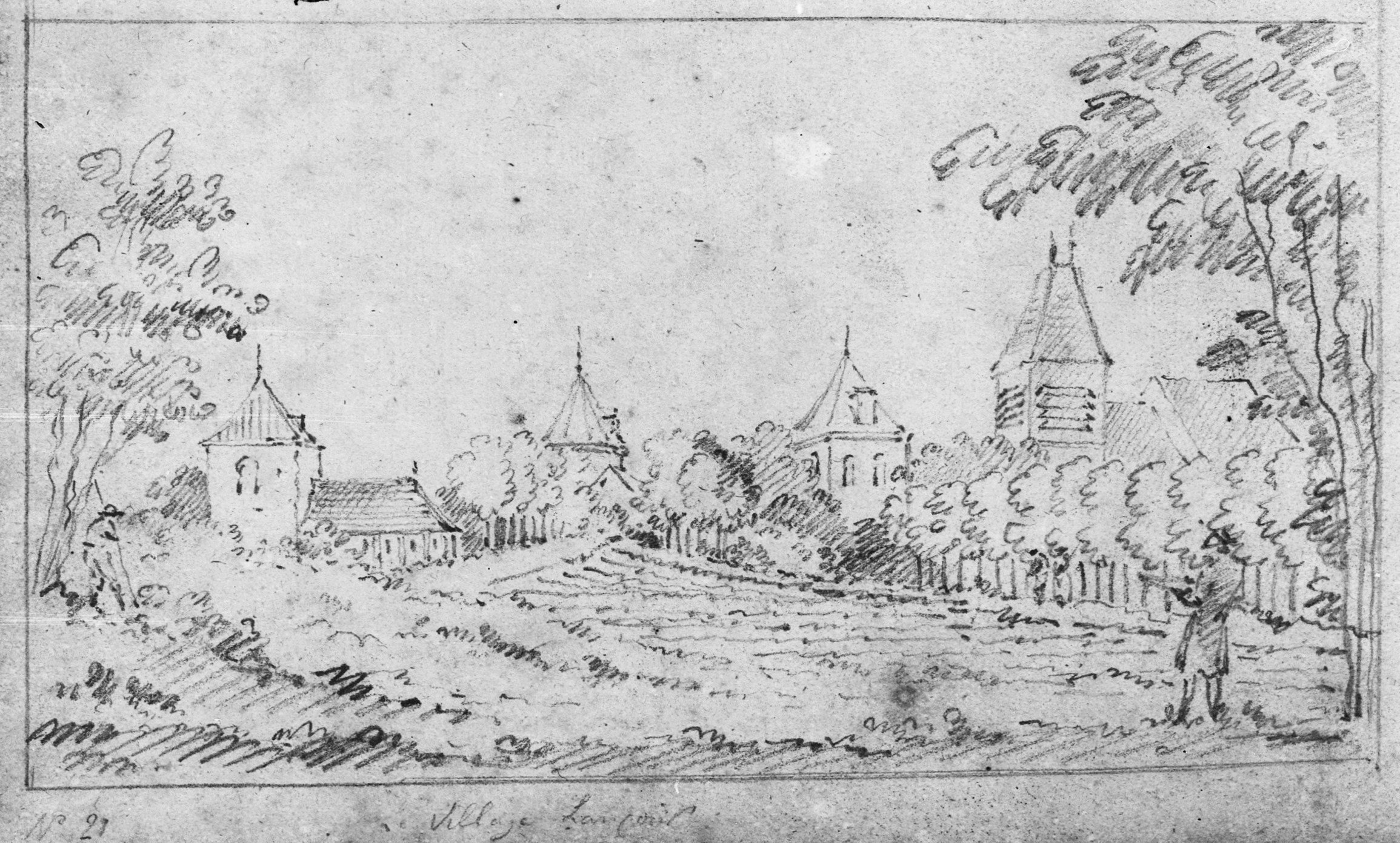 Dorpsgezicht: dorpsgezicht, tekening reproduktie uit schetsboek D.Verrijk